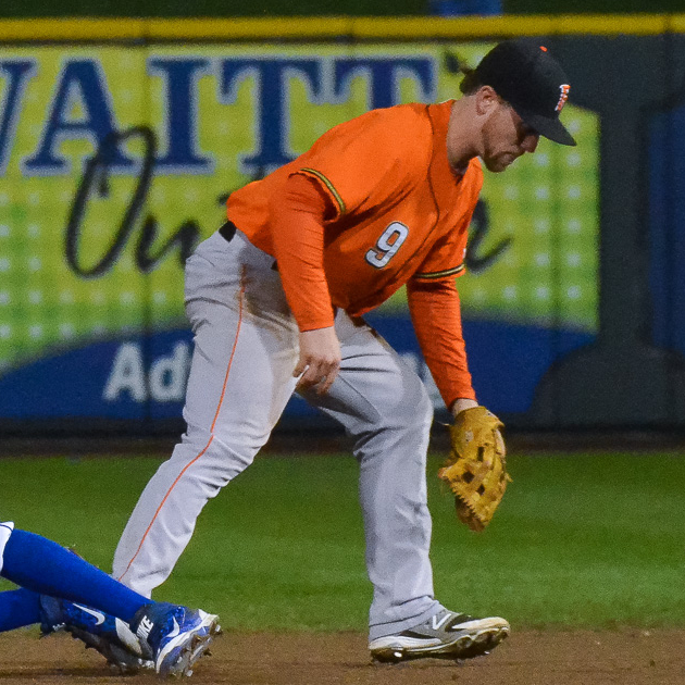 Nolan Fontana